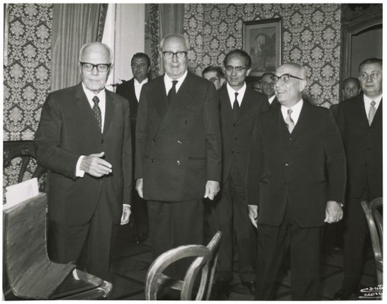 Presentazione dei volumi "Montecitorio - Uomini e fatti" e "La Camera dei deputati" editi da Editalia Presentazione volumi "Montecitorio - Uomini e fatti" e "La Camera dei deputati"